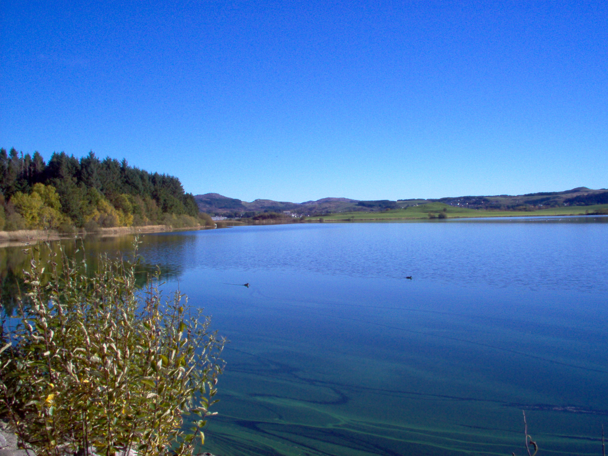 Frøylandsvatnet